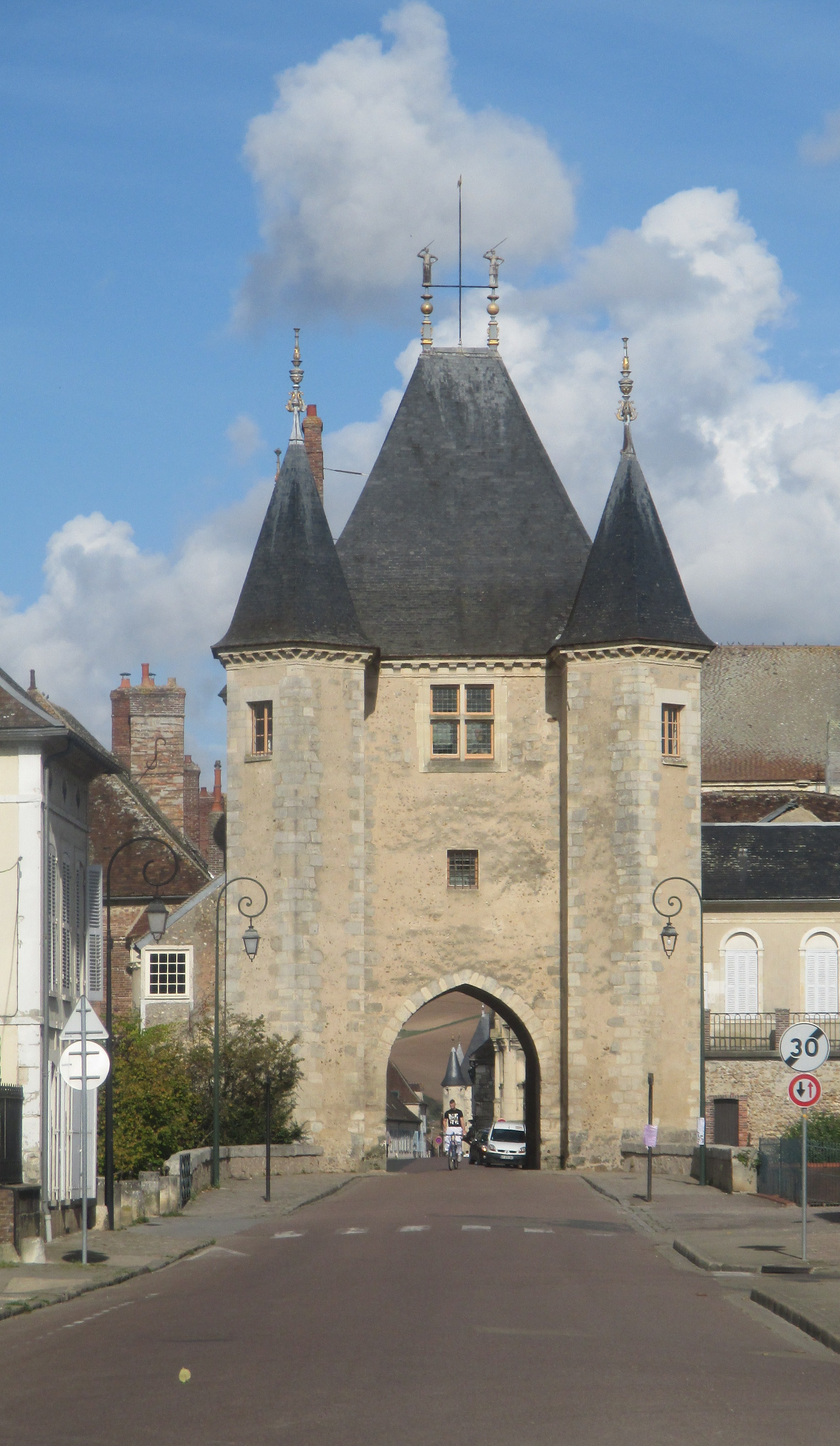 Porte de Joigny